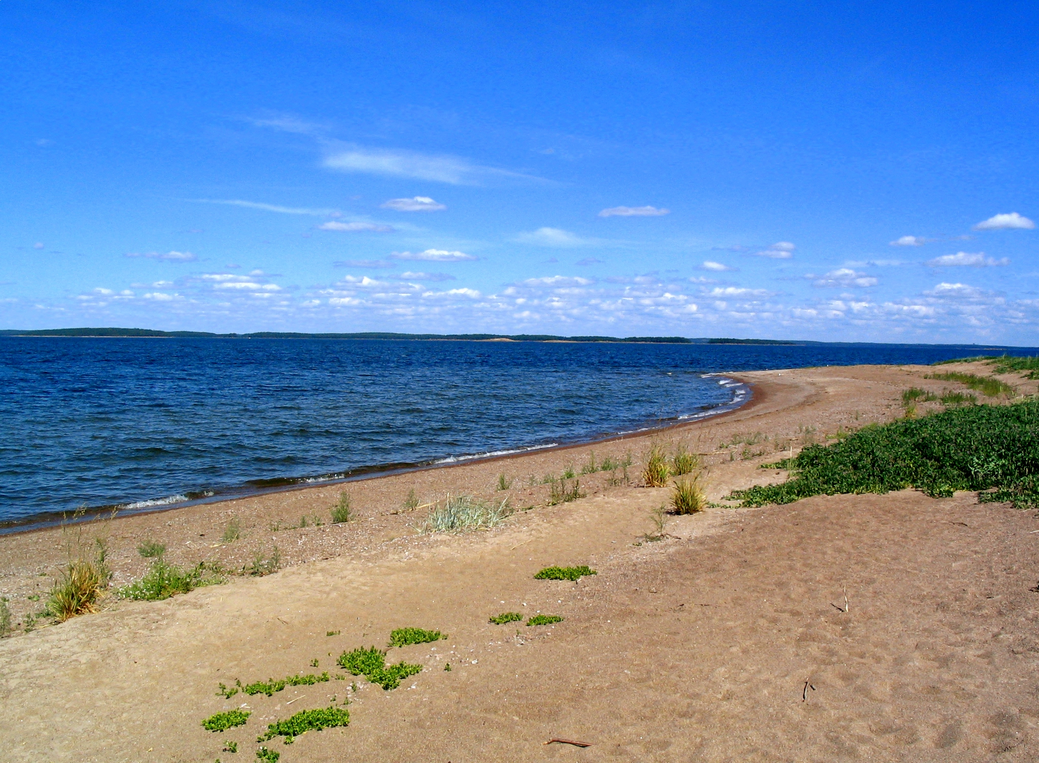 Kaunissaaren Pohjaspään hiekkarantaa.